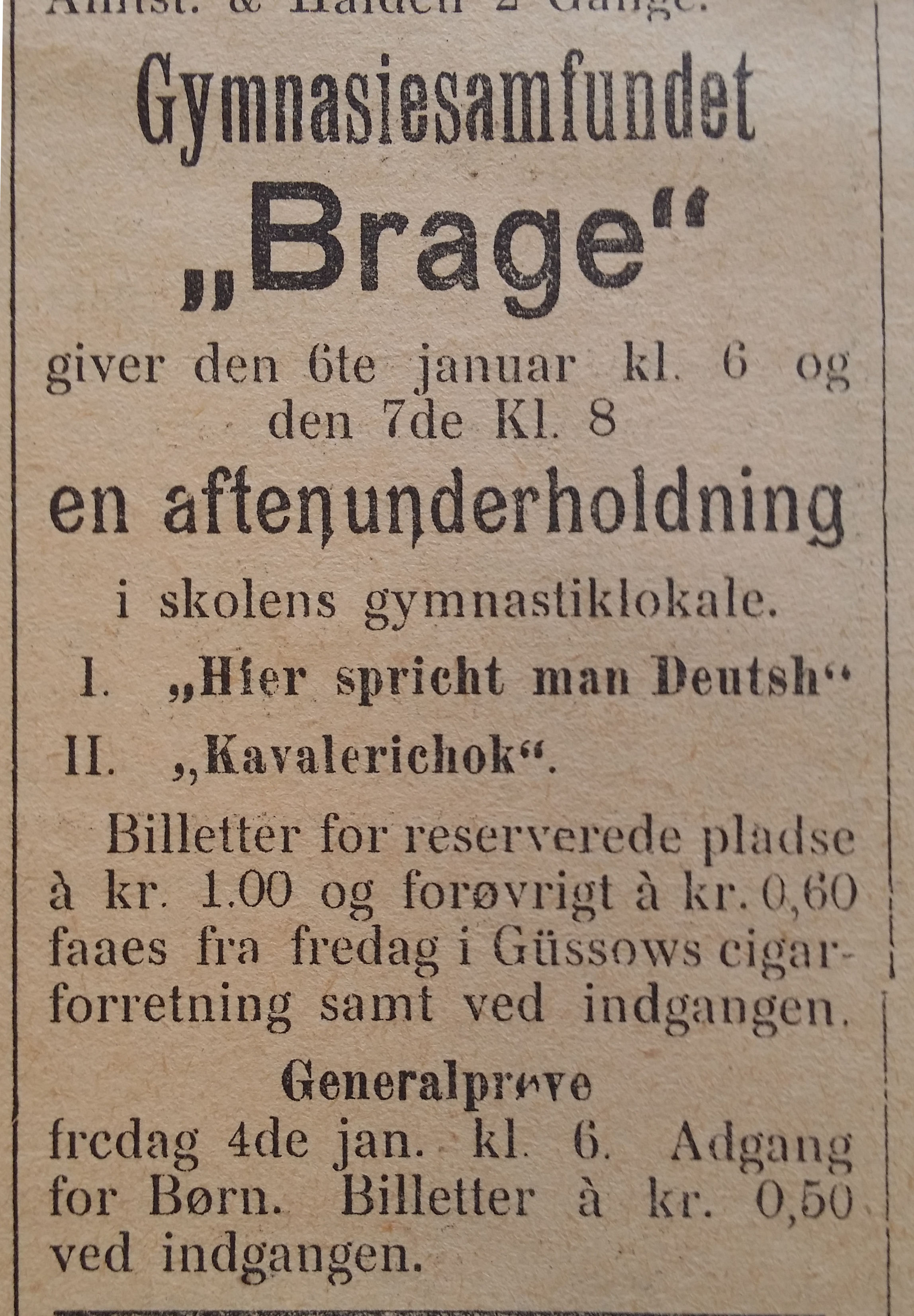 Annonse for Brageteatrets aftenunderholdning julen 1907